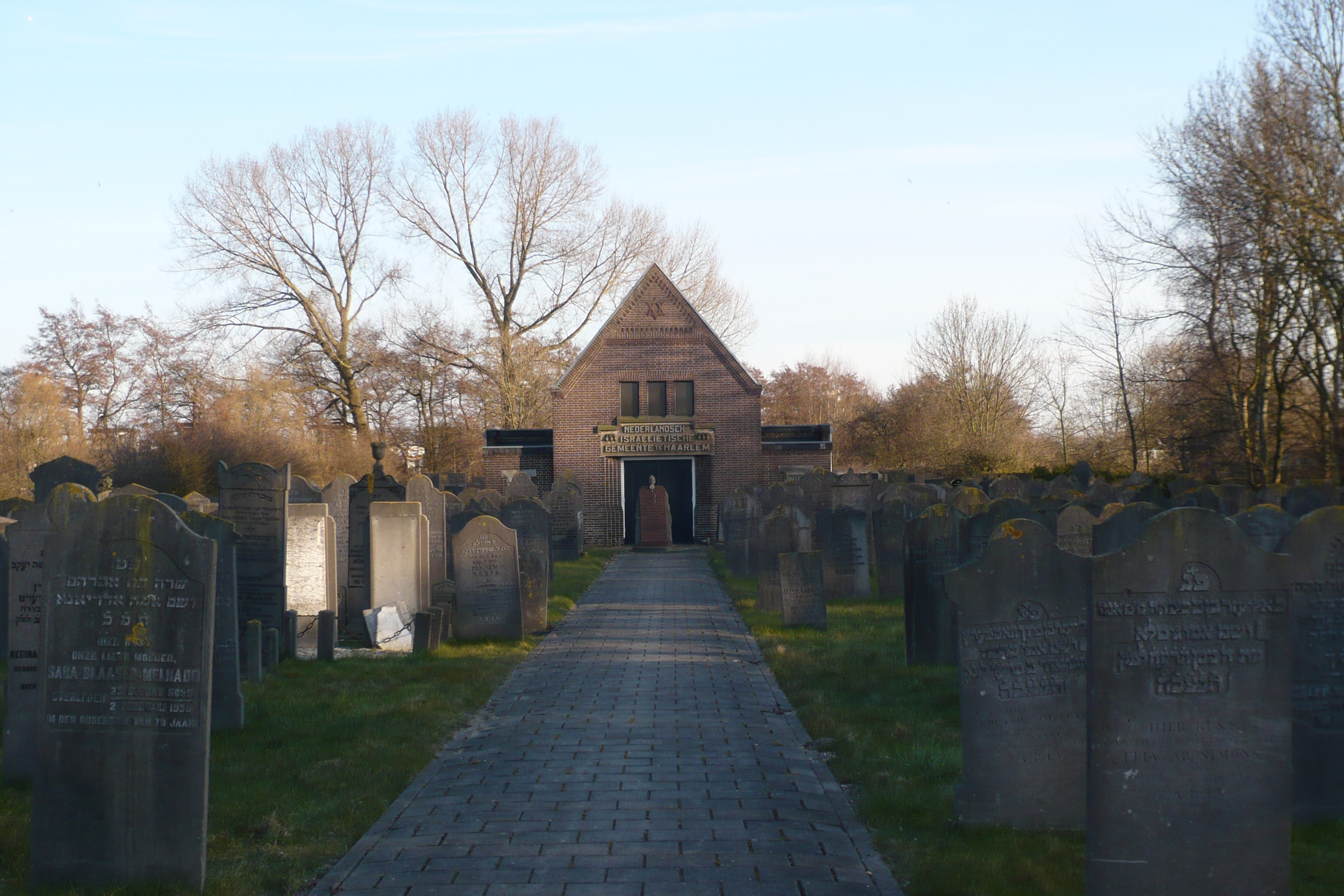 Joodse begraafplaats Amsterdamsevaart 280, Haarlem